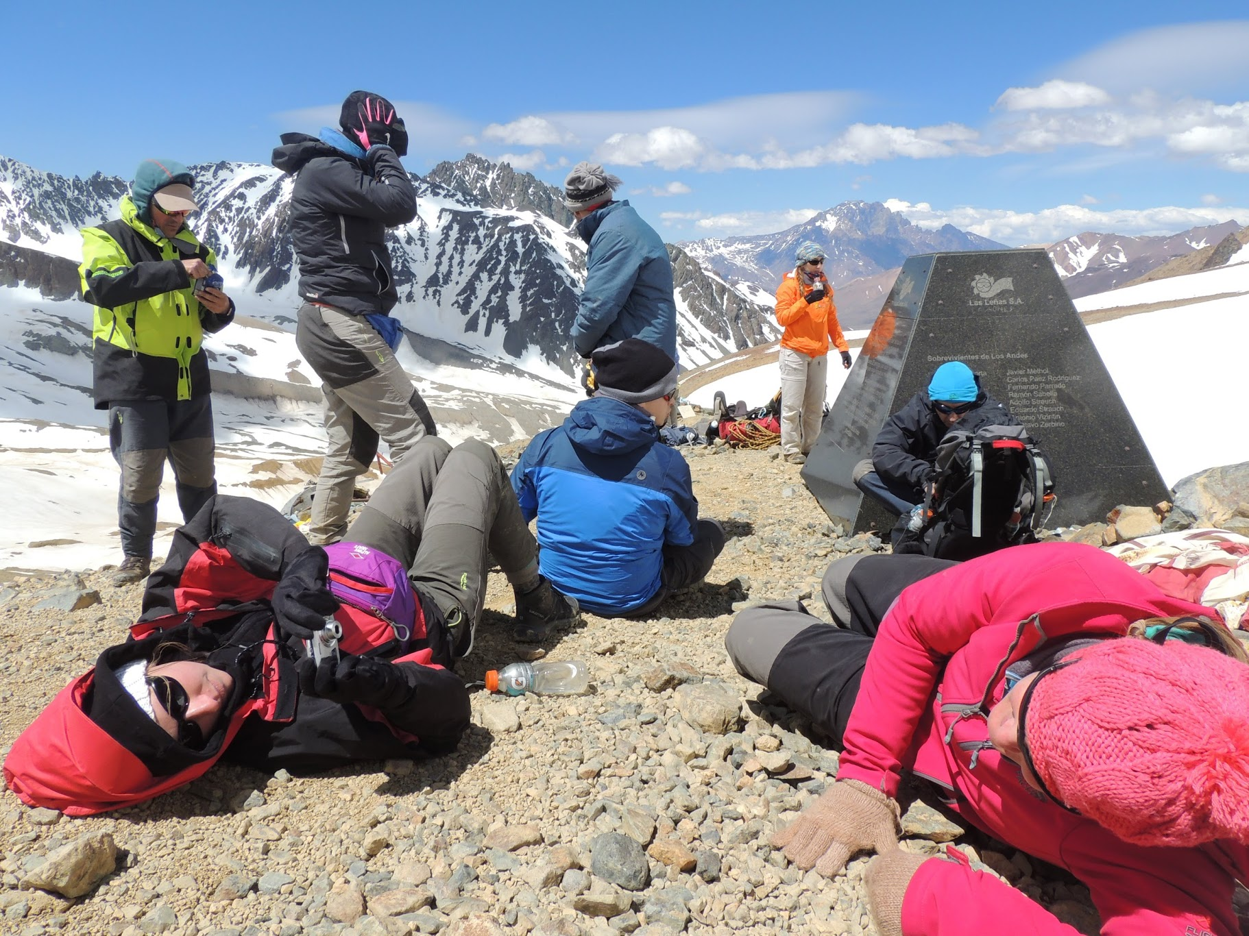 Excursionistas en el lugar del incidente